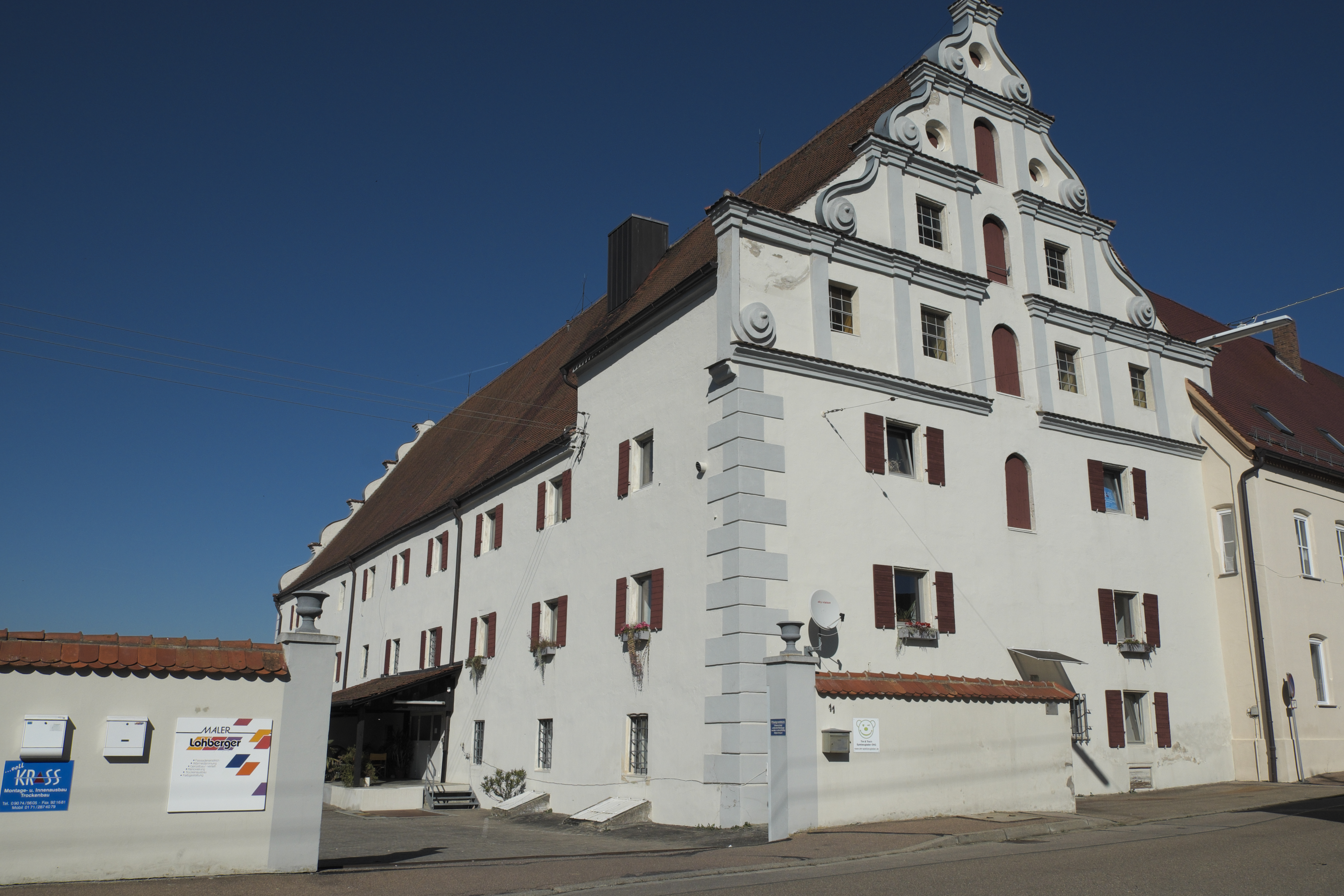 Kastenhaus in Höchstädt im Landkreis Dillingen an der Donau (Bayern)